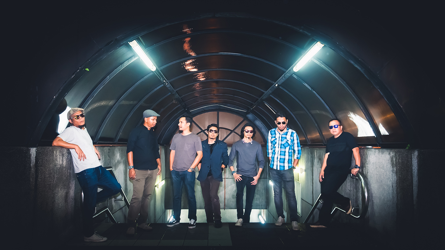 DEATH • BECOMES • HER band photo for promotional usage.